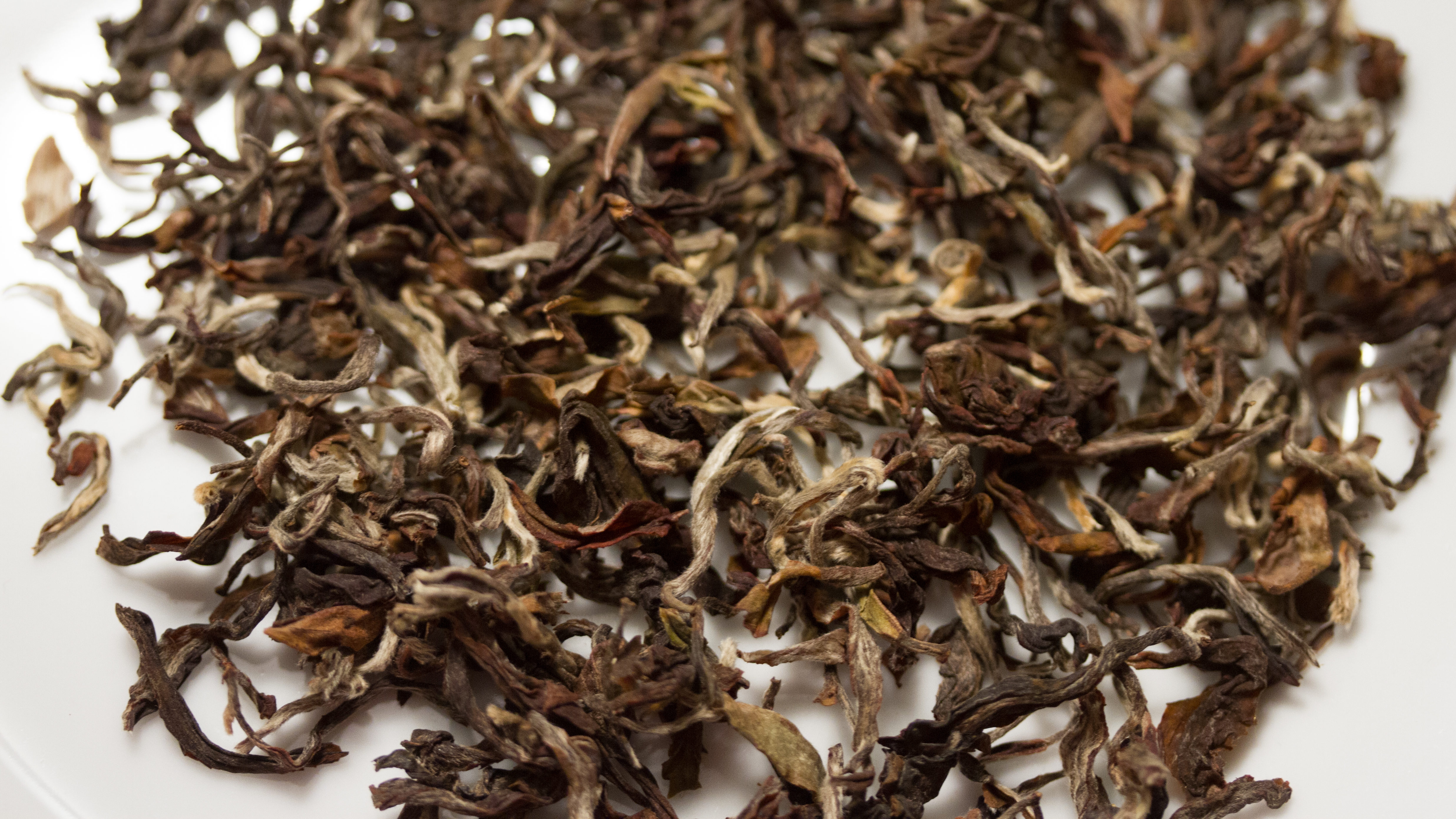 Guranse Tips G75 - récolte d'été 2016. Commercialisé en France par le palais des thés.